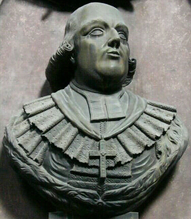 Darstellung des Fürstbischofs Georg Karl von Fechenbach auf seinem Epitaph im Würzburger Dom